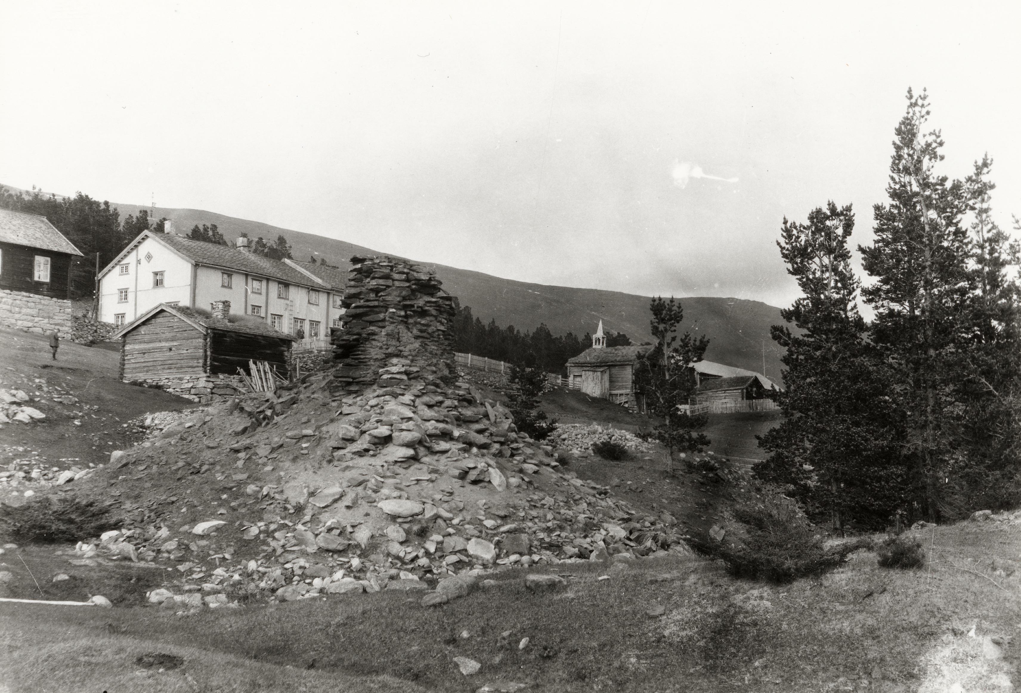 Lesjaverk i Lesja, Oppland Tunet og masovnrester